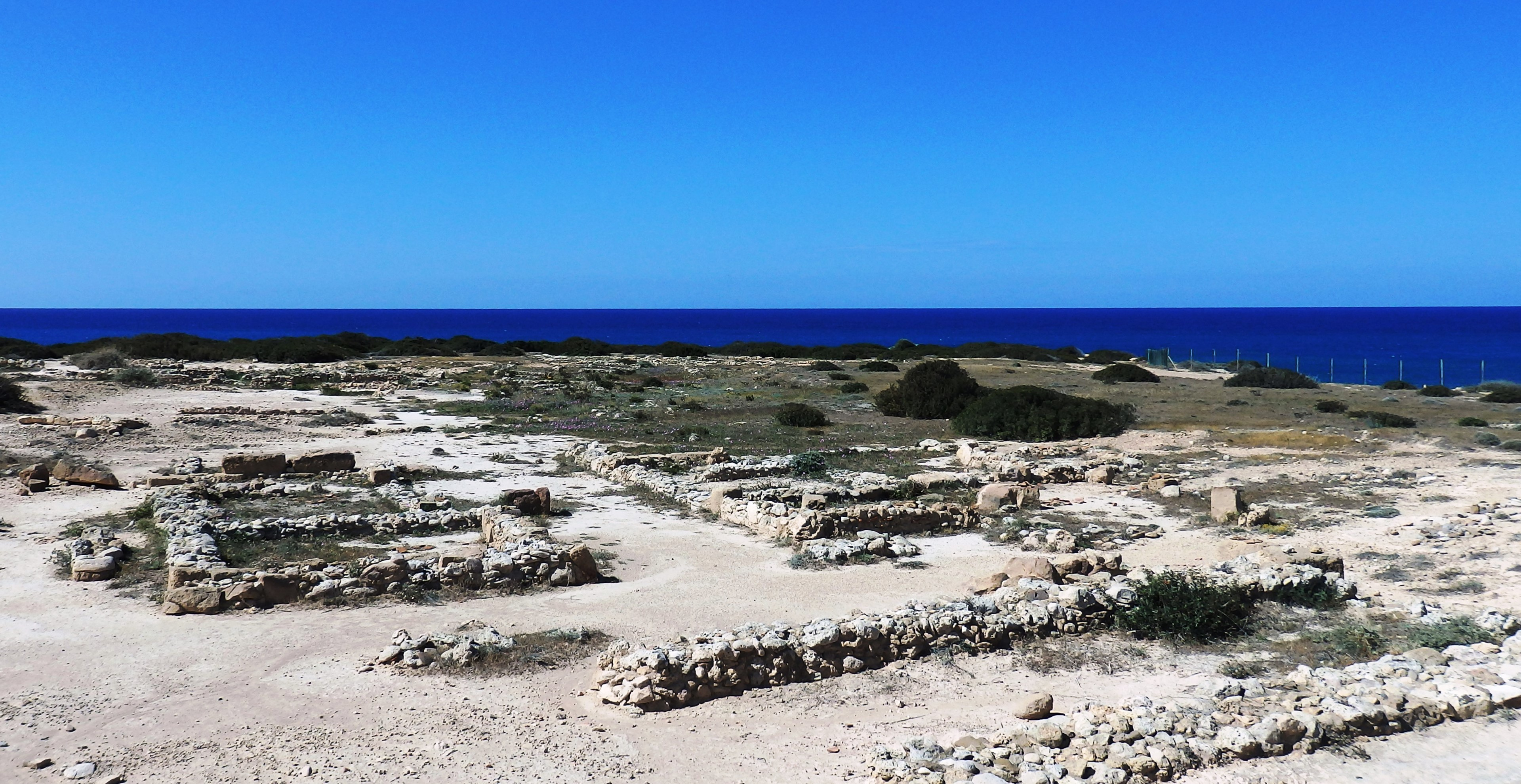 mykenische Fundamente auf Kap Maa